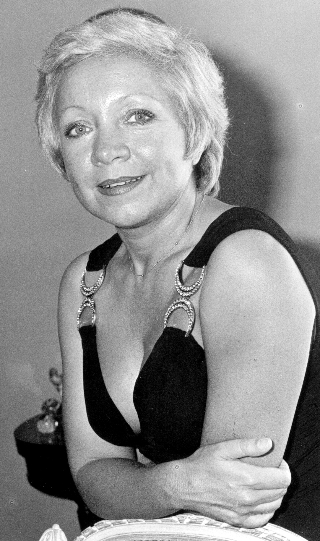 Photographie de la chanteuse Jane Berbié fournie par elle même (avec la permission d'inclusion) Réalisée par Michel Szabo (22 av de Maison blanche, 94470 Boissy St leger - France)